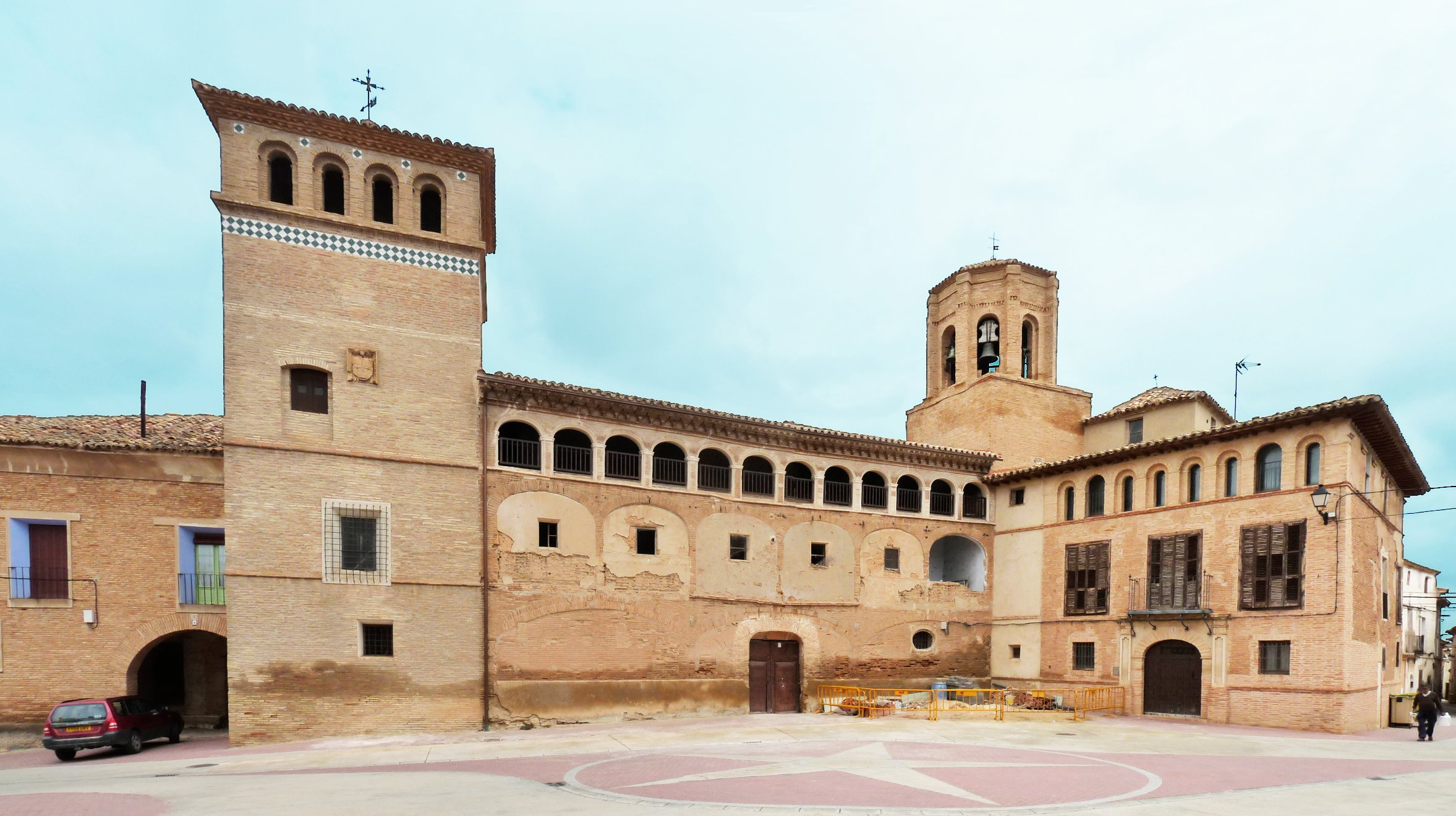 Ambel - Palacio de los Hospitalarios (siglo XVI) y torre de la iglesia de San Miguel (dcha)